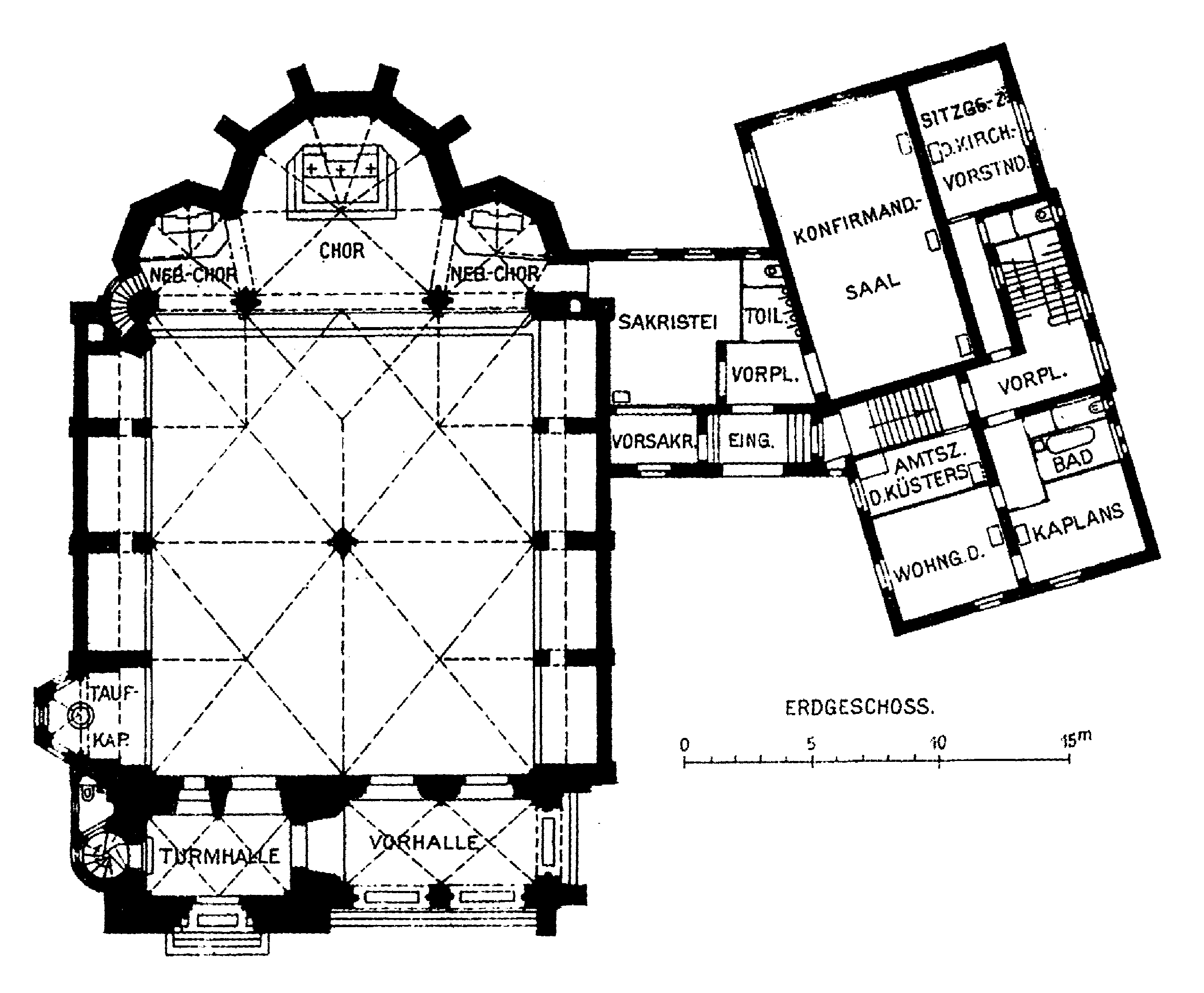 Eingescannte Bauzeichnung vom Grundriss der Kirche